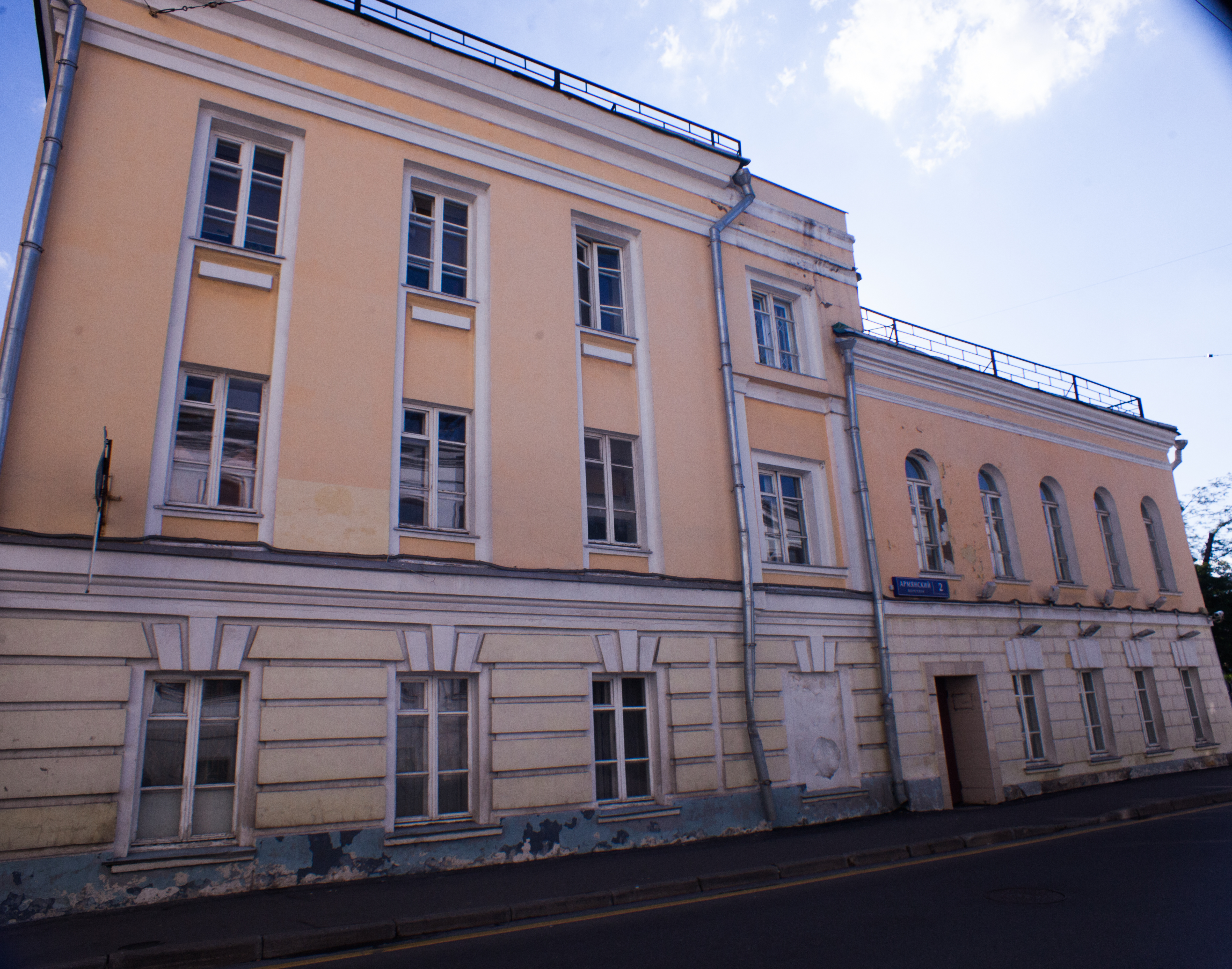 Лазаревский институт восточных языков.